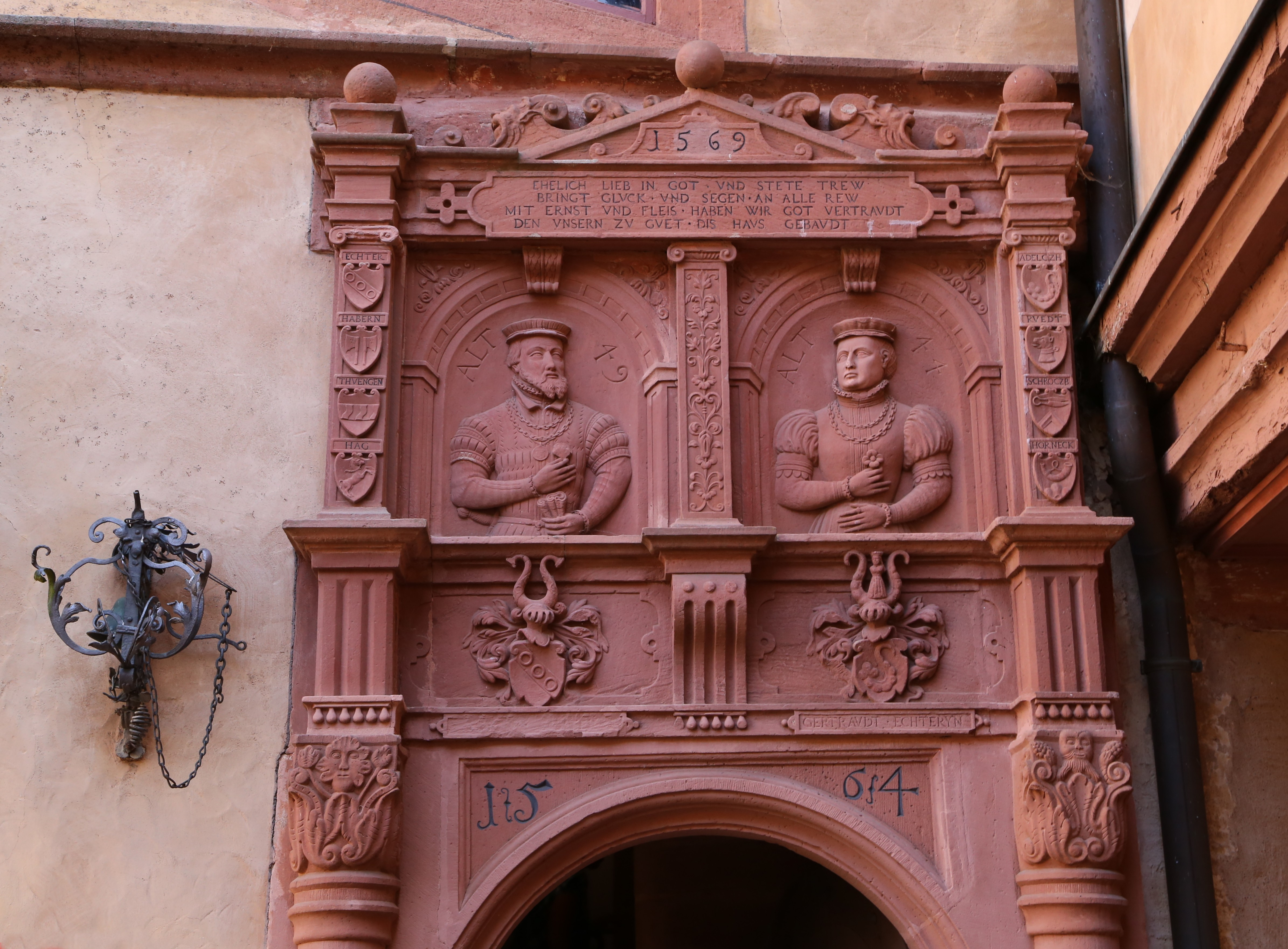 Wasserschloss Mespelbrunn Dreiflügelanlage über quadratischem Grundriss mit zwei runden Ecktürmen und rundem Bergfried, Bergfried um 1430, Wohnbauten zweite Hälfte 16. Jahrhundert, 1904 durch Friedrich von Thiersch restauriert; mit Ausstattung.